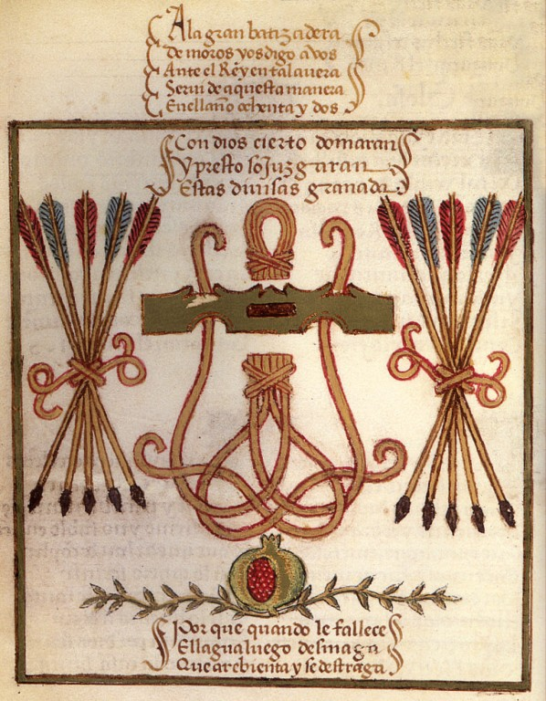 Divisas de los Reyes Católicos en el Cancionero de Pedro Marcuello: yugo con el nudo gordiano cortado, haces de flechas y granada